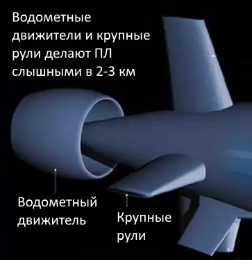 Водометный движитель с рулями